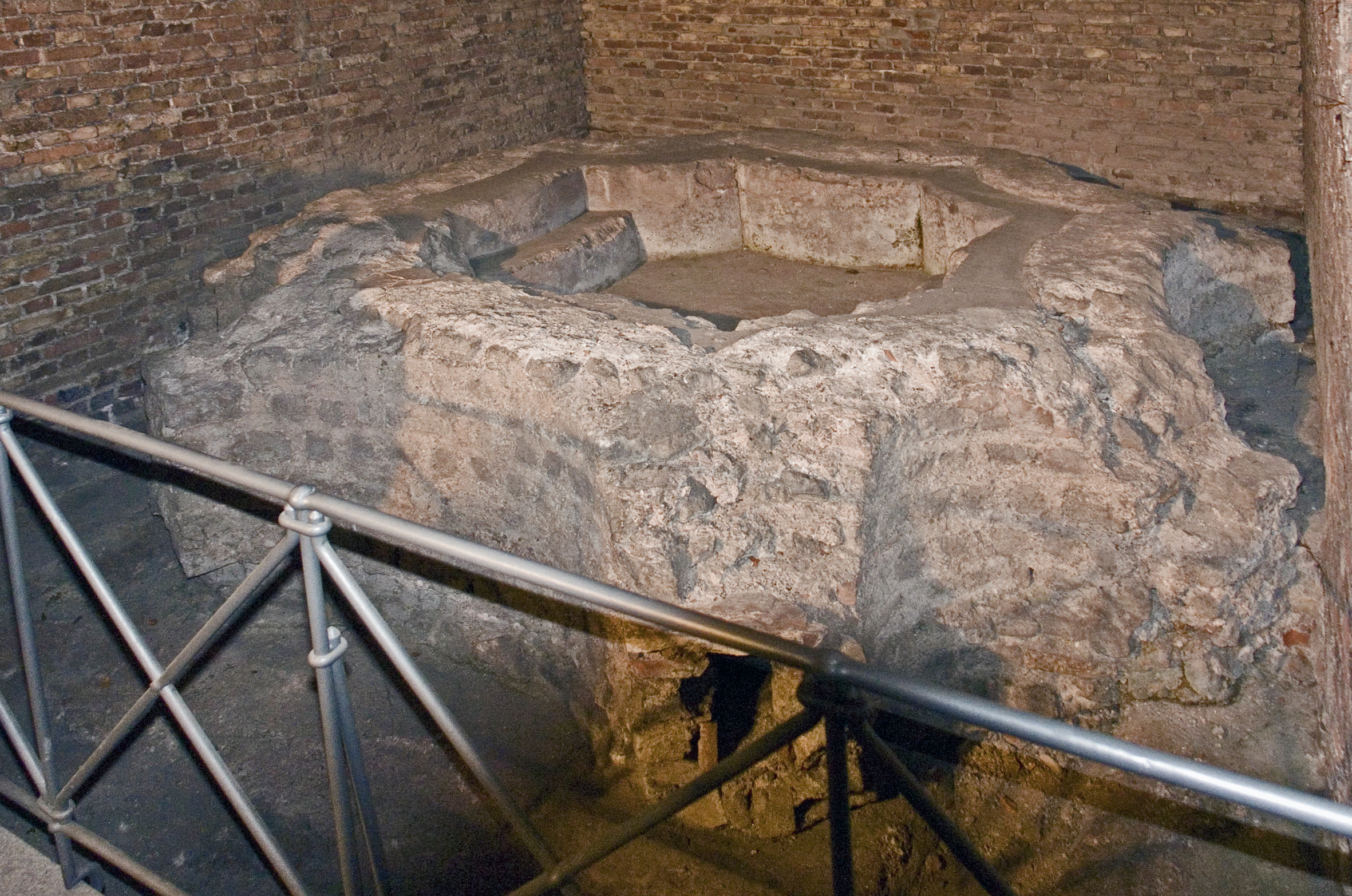 Baptisterium unter dem Kölner Dom